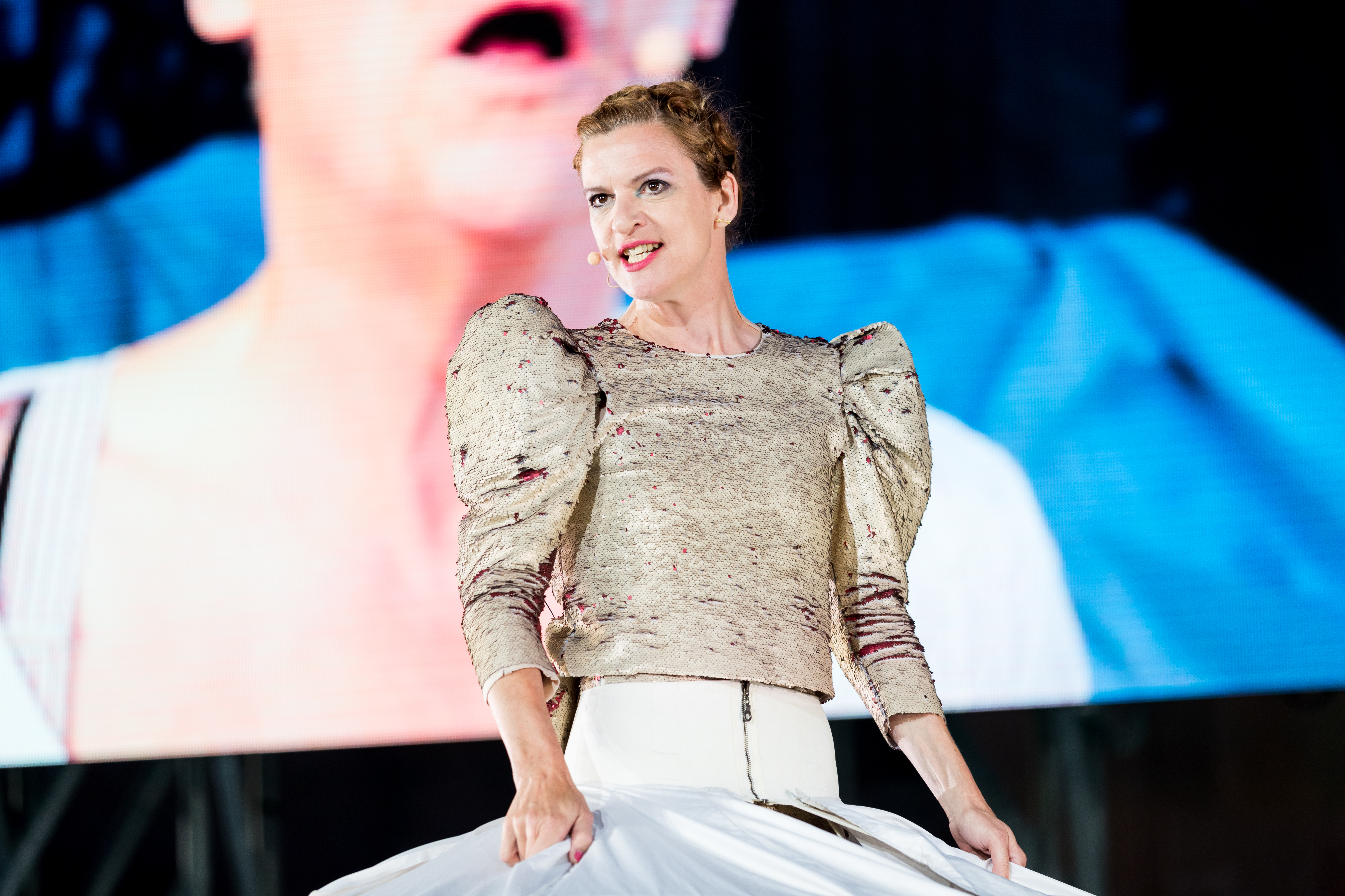 Inga Busch during Nibelungenfestspiele ( at Worms, Rheinland-Pfalz, Germany on 2019-07-10, Photo: Sven Mandel